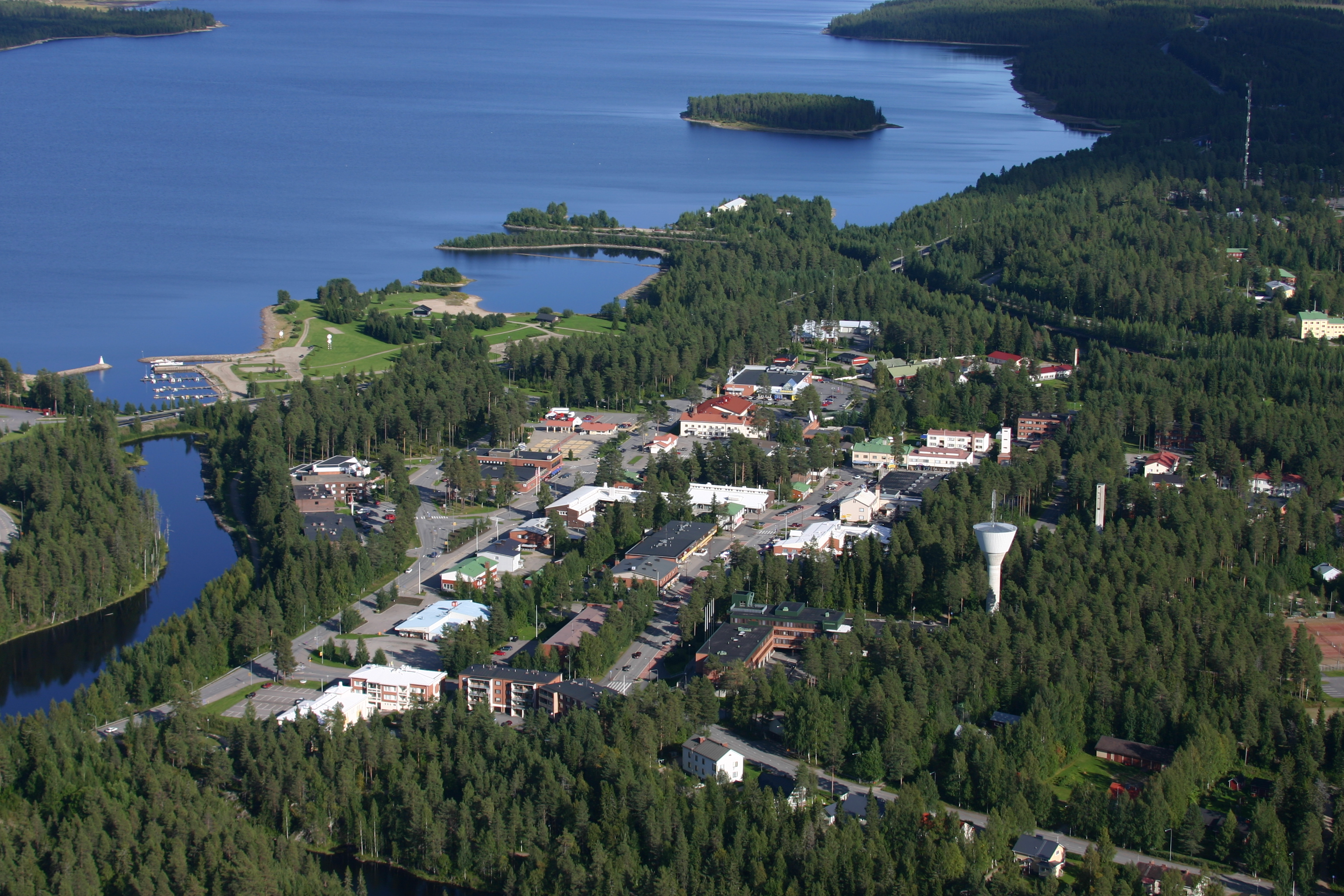 Ilmakuva Suomussalmen keskustasta